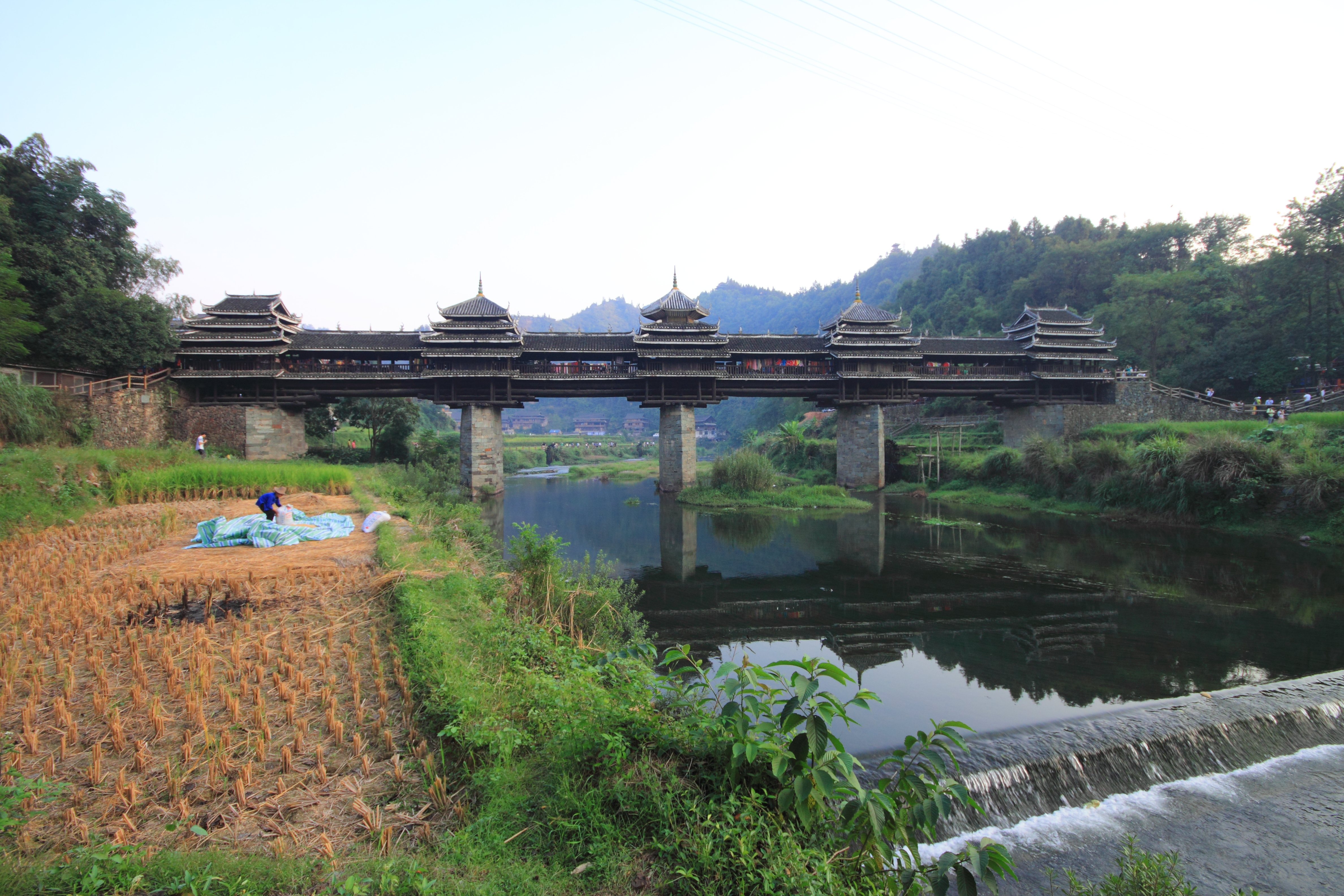 三江侗族自治县林溪乡程阳永济桥 —— 东北侧